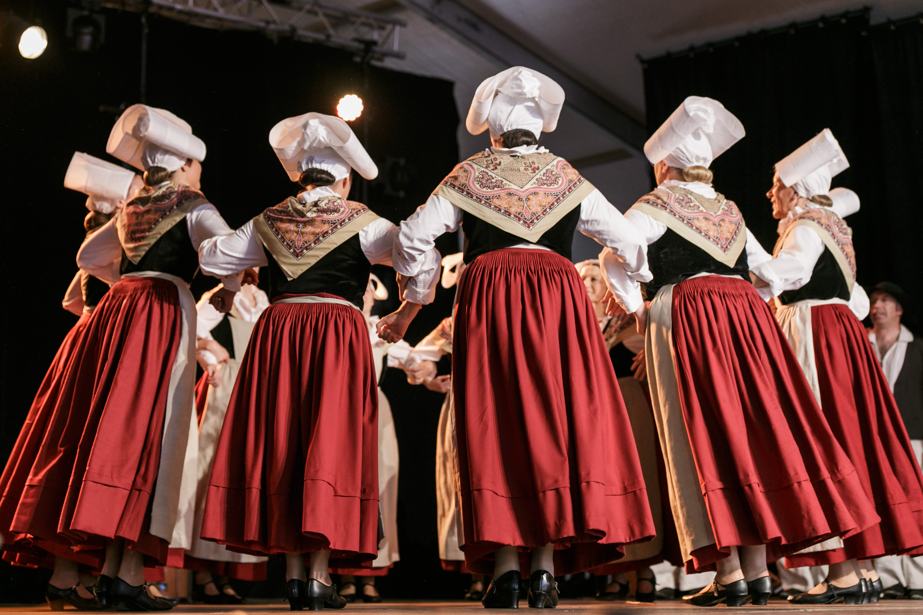 Cercle celtique de Cesson-Sévigné, spectacle de danse pour Kemper en Fête au festival de Cornouaille le dimanche 23 juillet 2017.